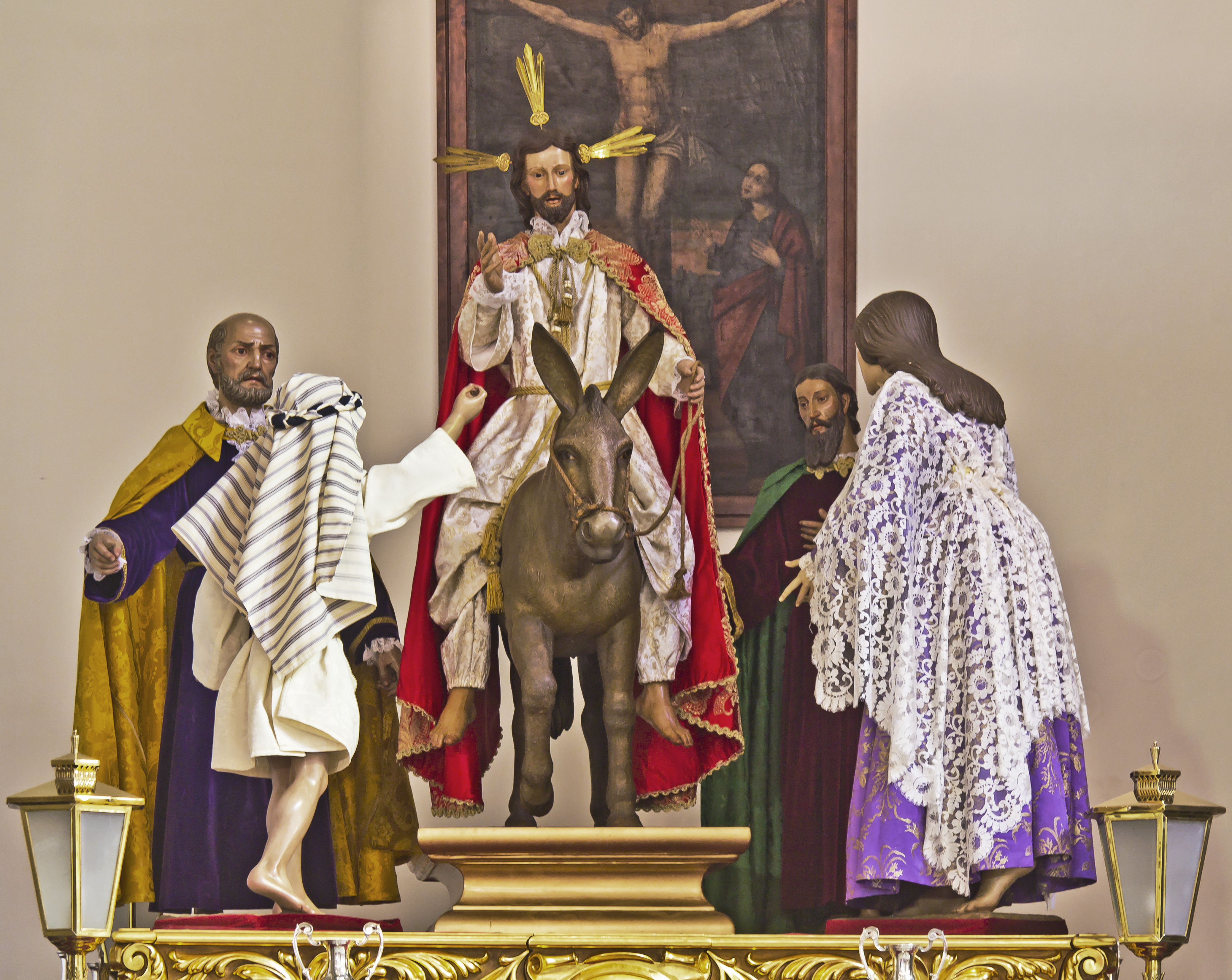 Paso Entrada de Jesús en Jerusalén